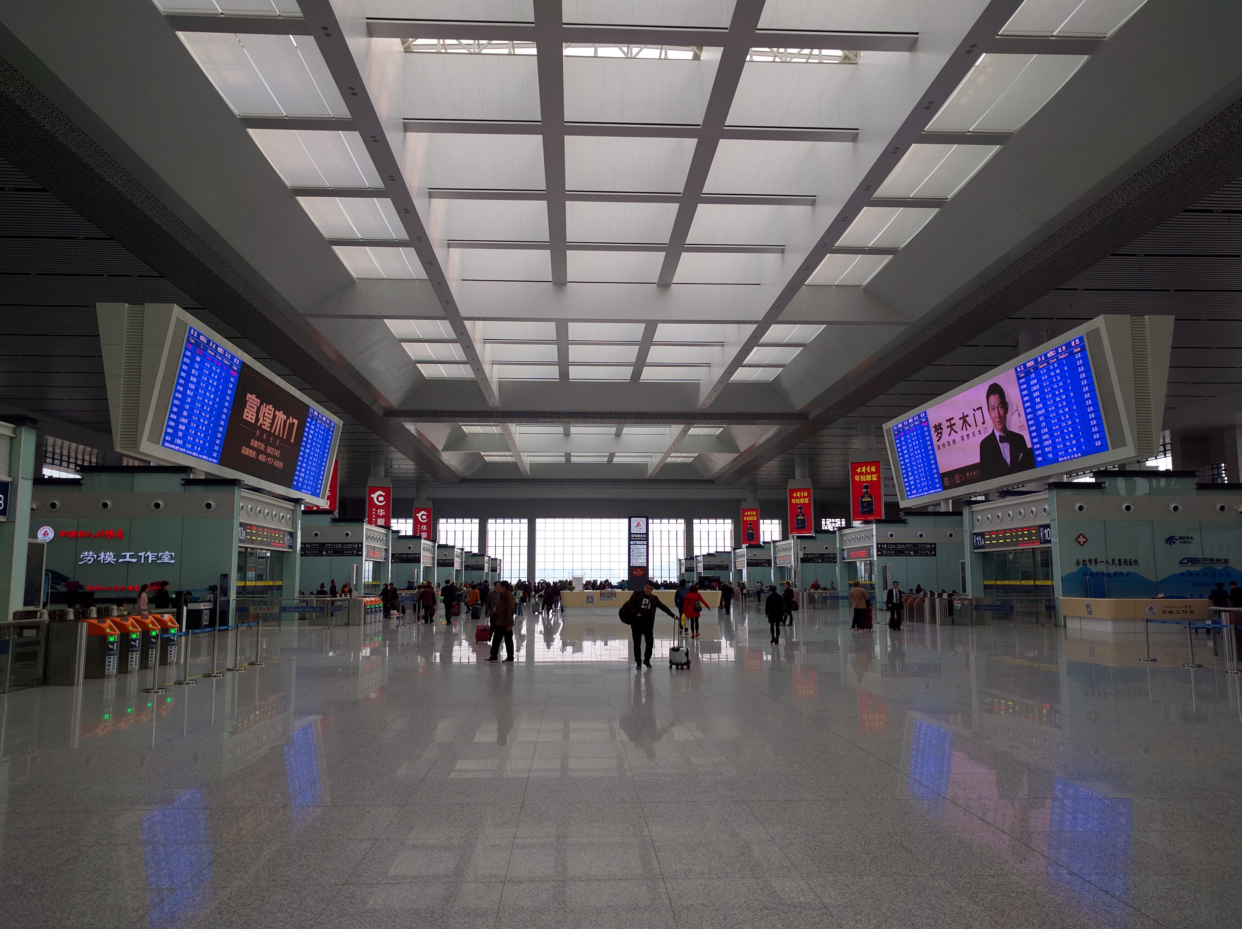 中文（中国大陆）: 火车合肥南站内部